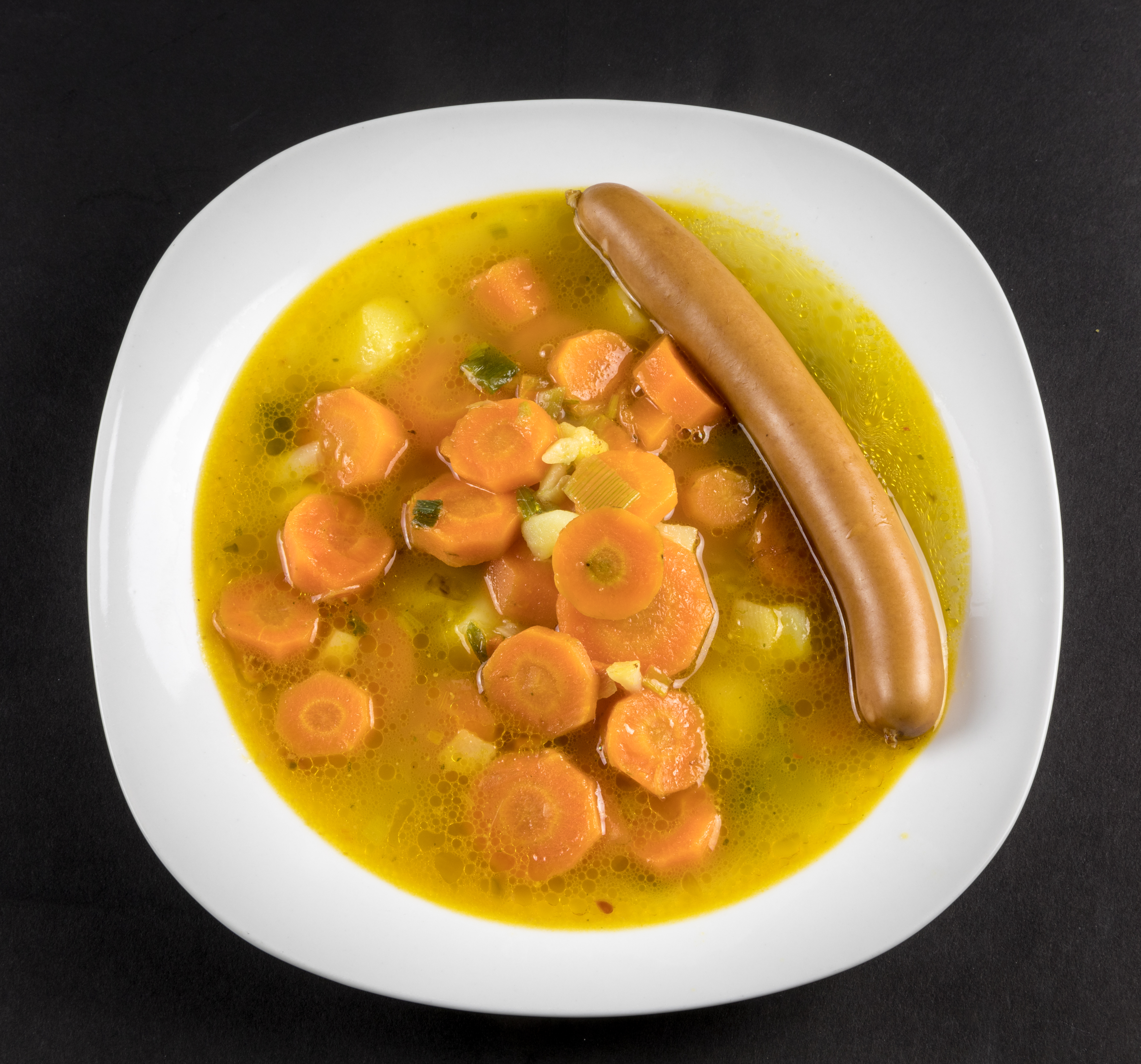 Möhrensuppe/Karottensuppe mit Bockwurst auf weißem Teller